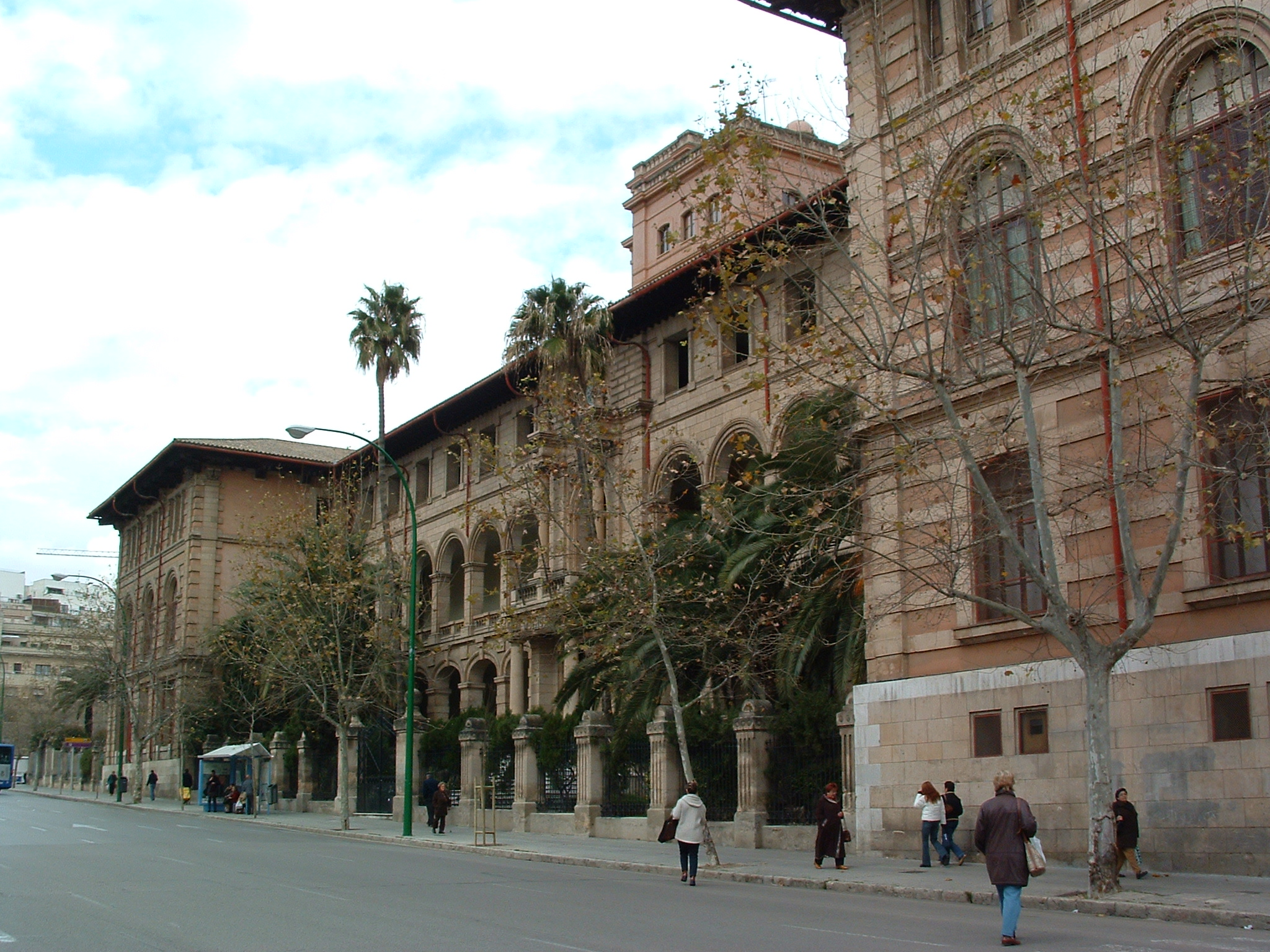 Façana Principal de l'IES Ramon Llull